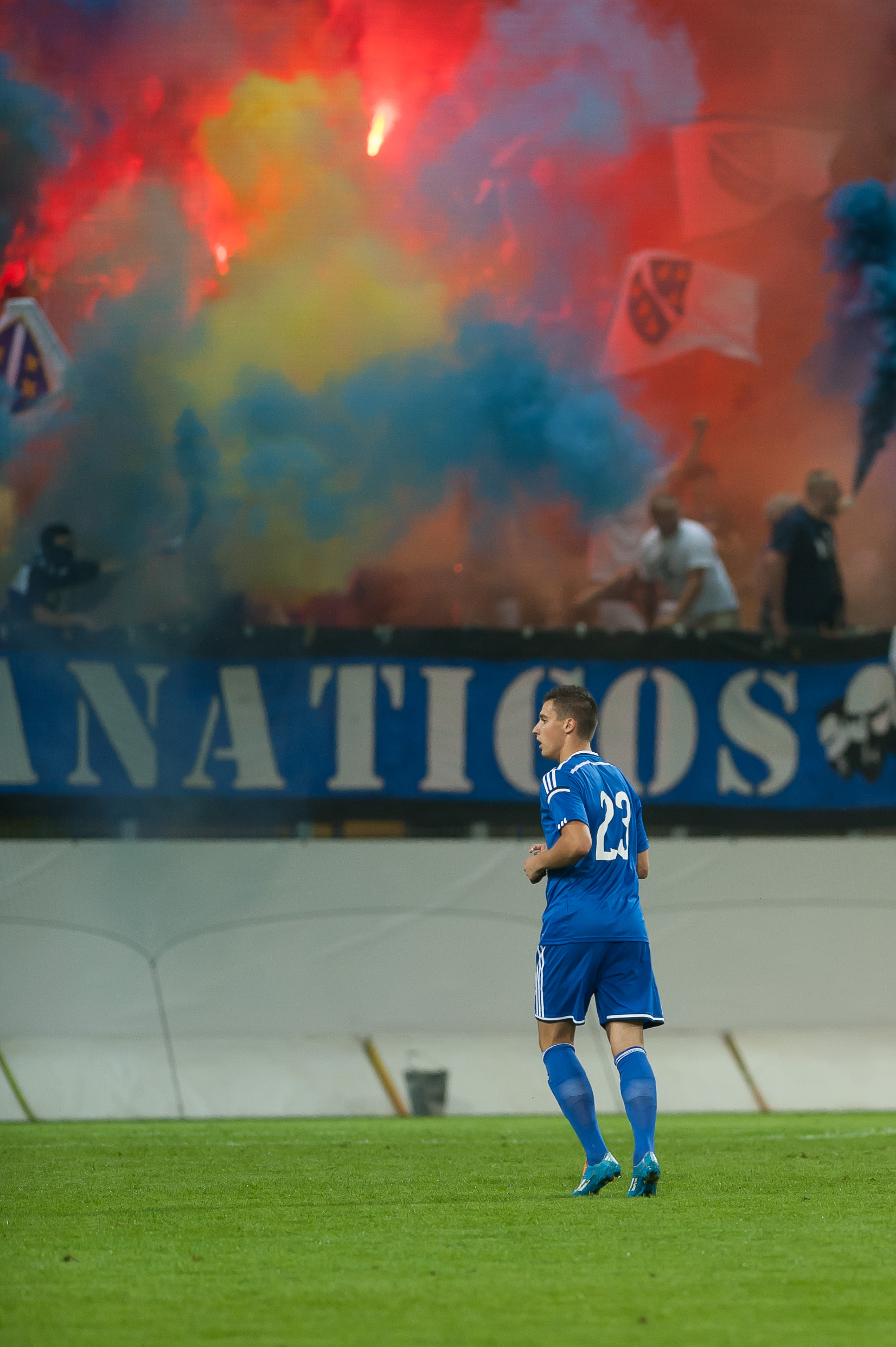 Fußball U21 EM-Qualifikation Österreich gegen Bosnien und Herzegowina St. Pölten, 5. September 2014 - Rade Krunić